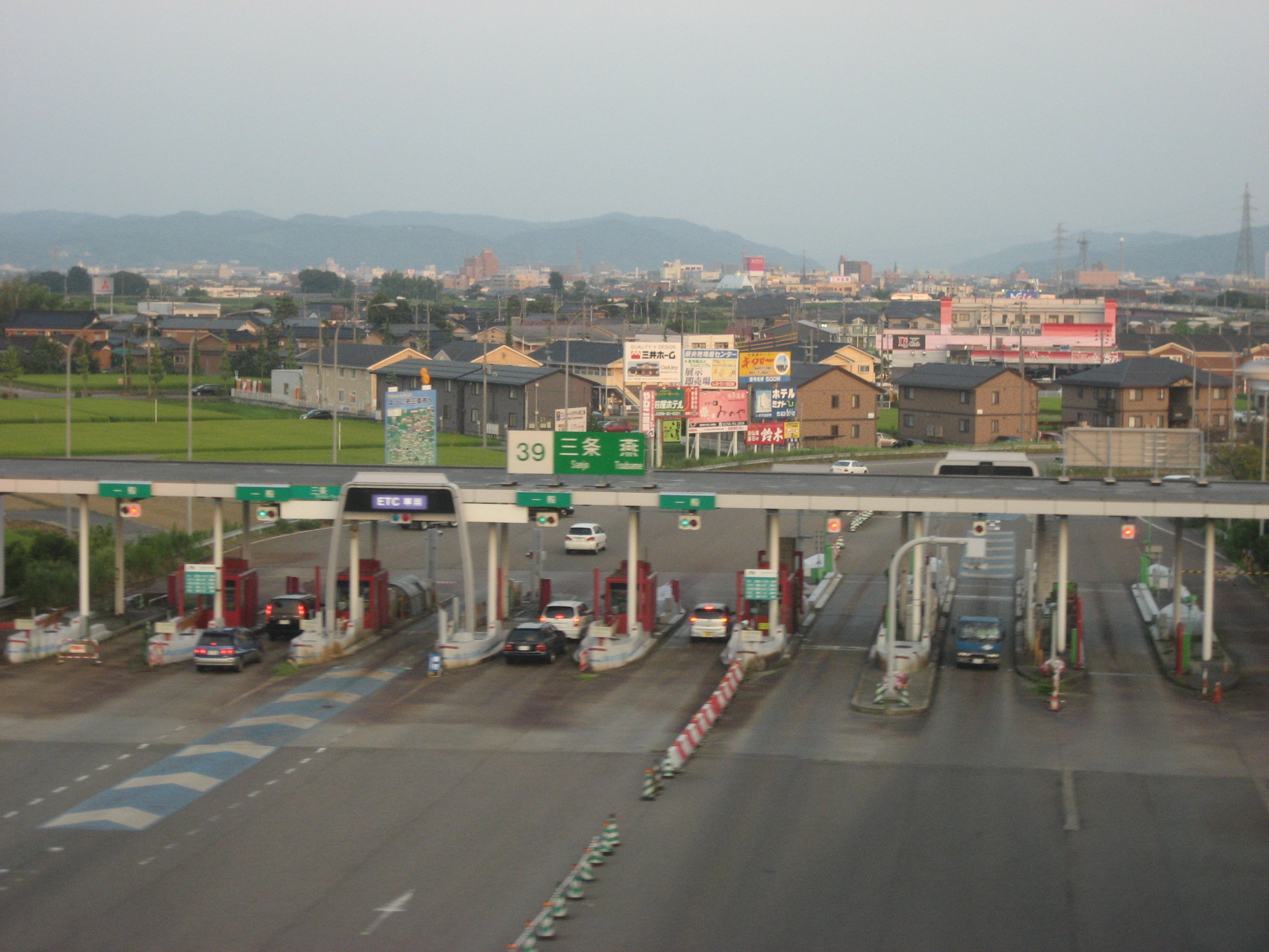 Kotaka, Tsubame, Niigata Prefecture 959-1241, Japan